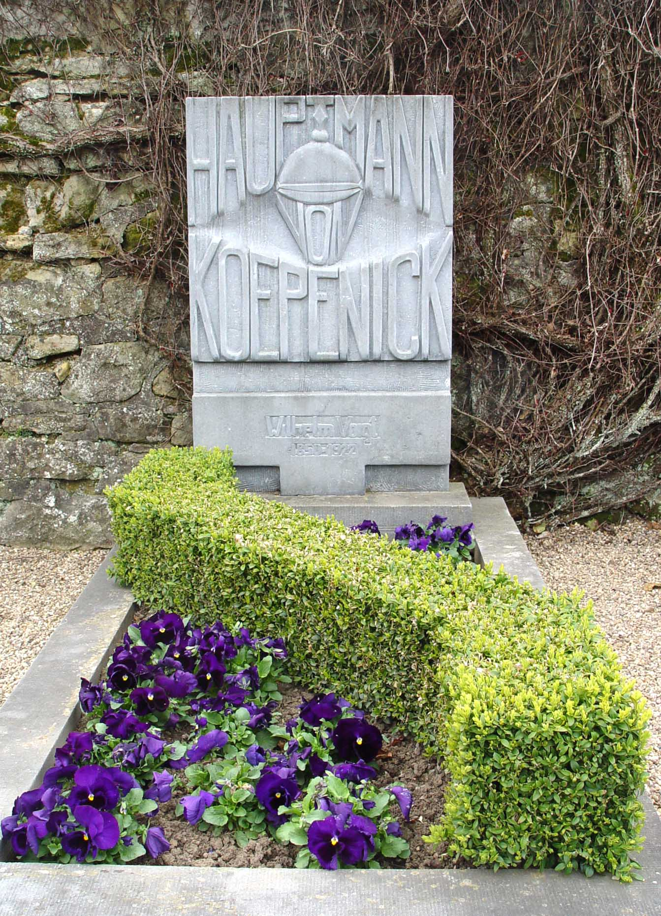 Wilhelm Voigt Graf.